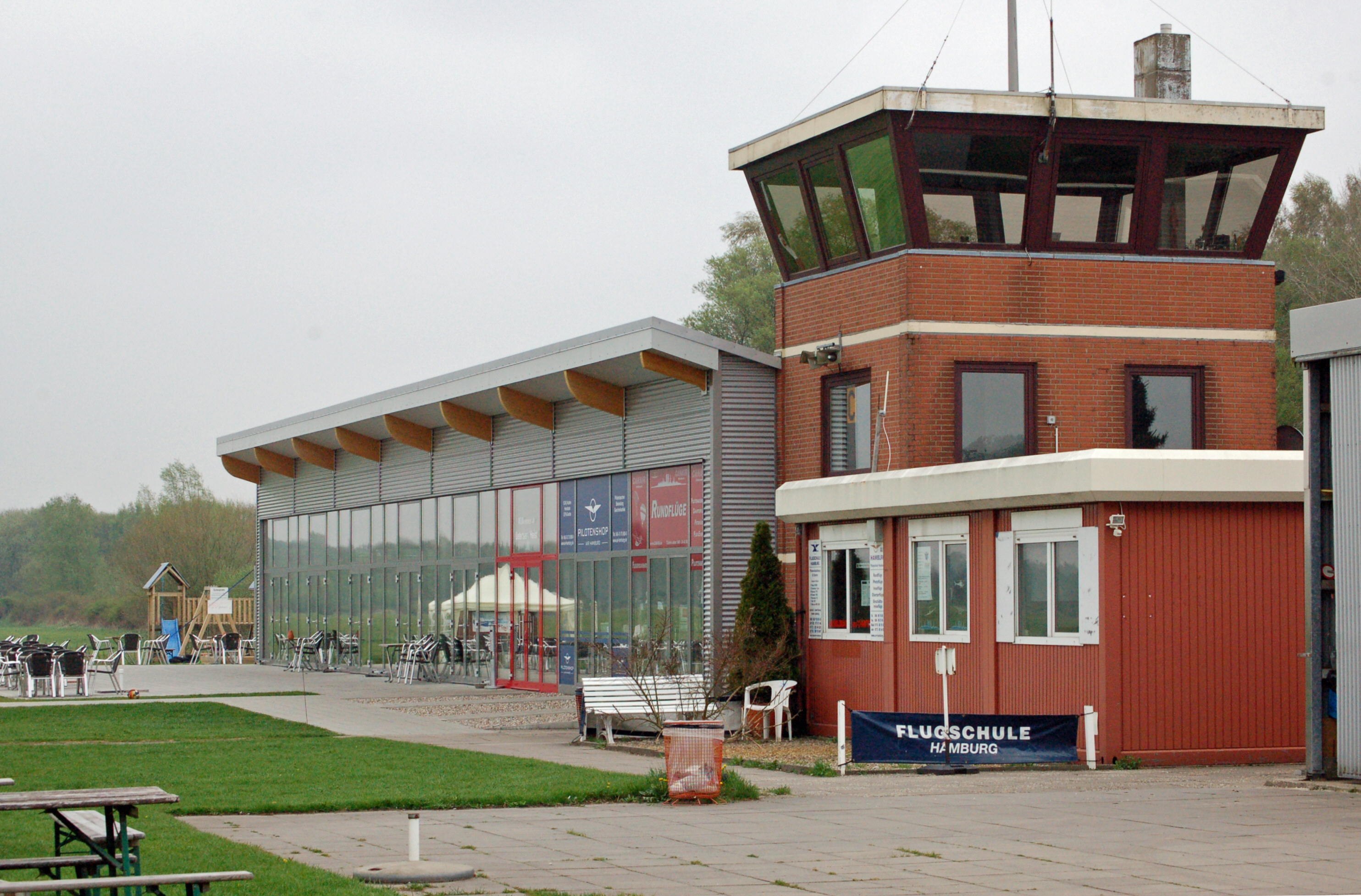 Der Tower mit dem angebauten Restaurant auf dem Flugplatz Uetersen